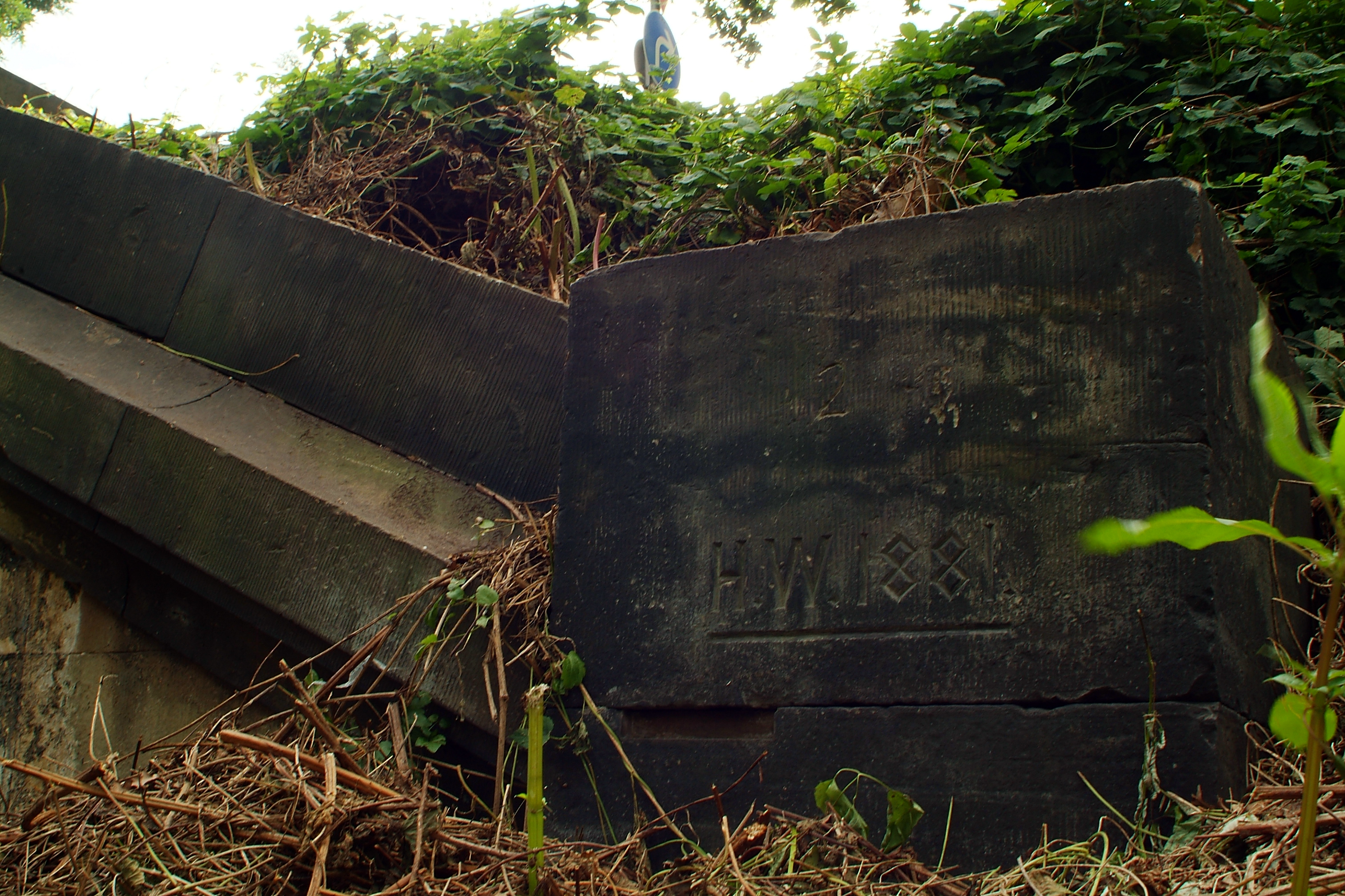 An einer der Umfassungsmauern der Clevertorbrücke in Hannover, hier am Ufer der Leine am Franz-Mock-Weg'. An dem Sockelstein unten ist eine alte Gravur sichtlich: "H. W. 1881".